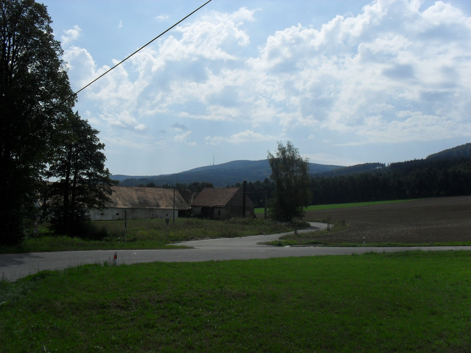 Fotky z mého výletu na Šumavskou Kleť